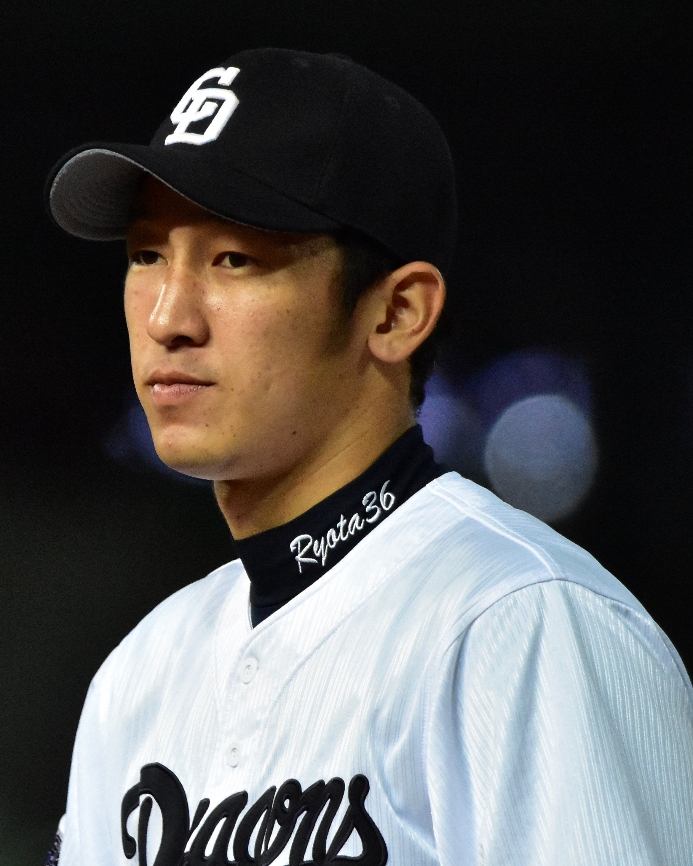 2016年12月18日、台中インターコンチネンタル野球場にて